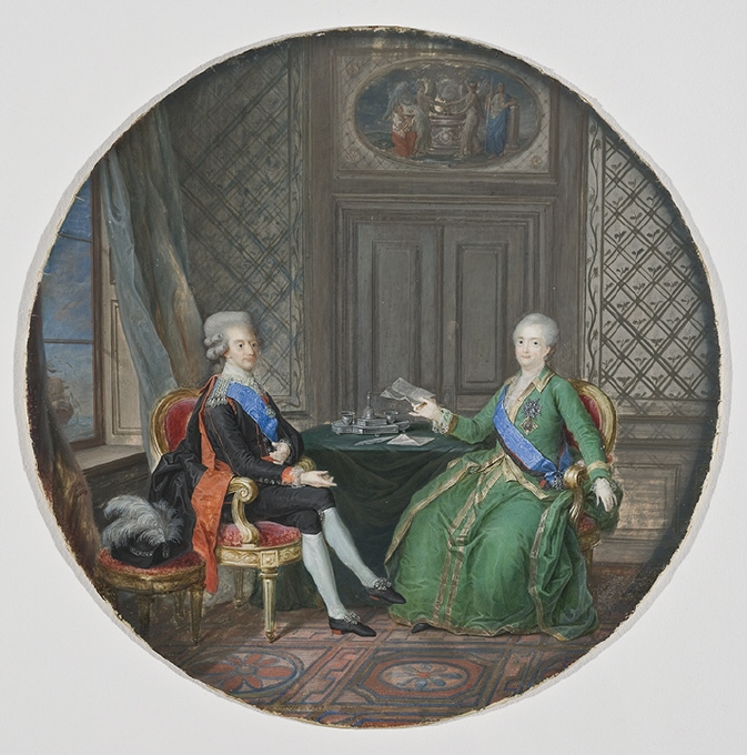 Переговоры Екатерины II и шведского короля Густава III. Миниатюра. Национальный музей. Стокгольм.